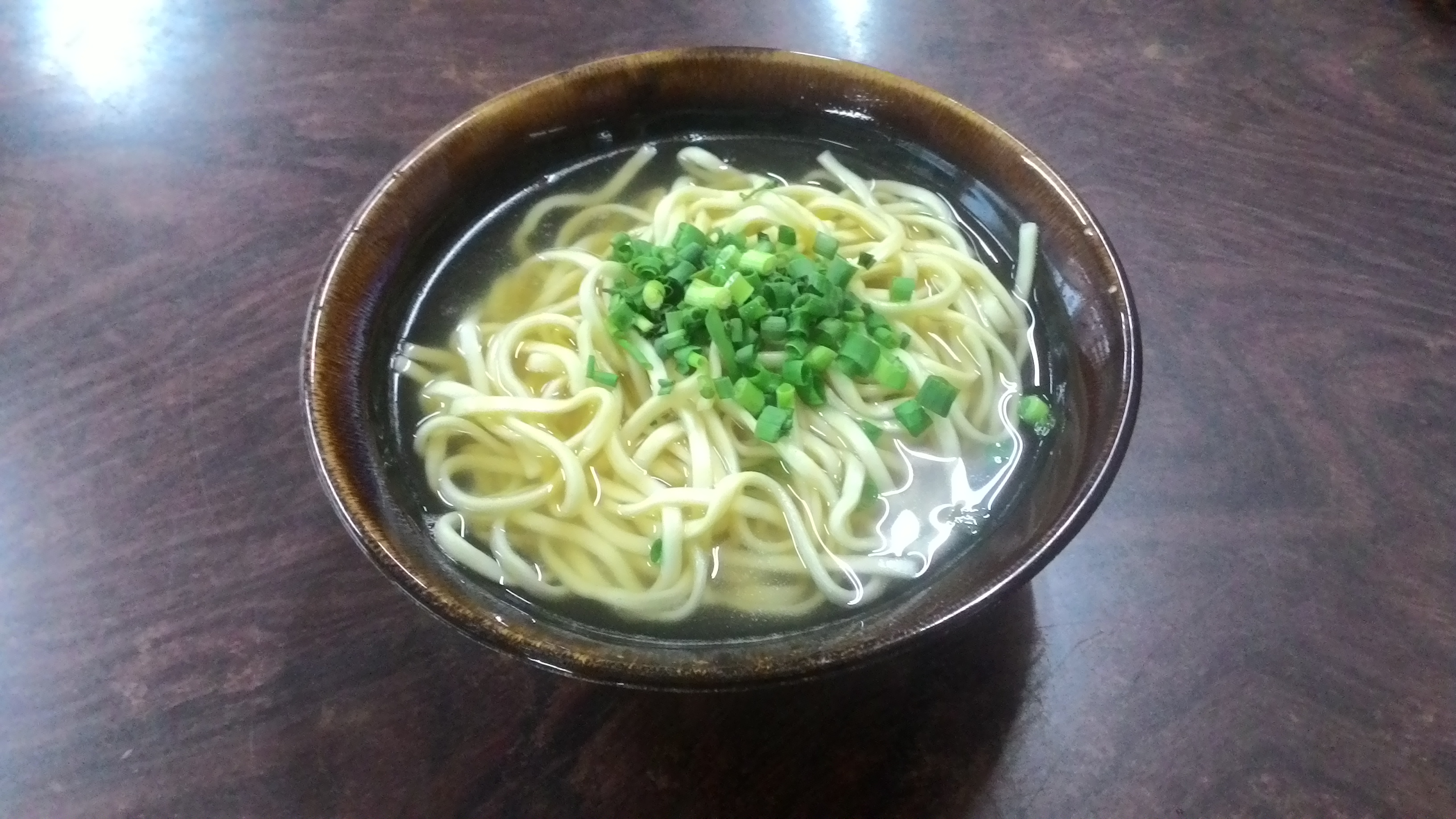 宮古そば、そば処ひらら（豊見城市）にて。